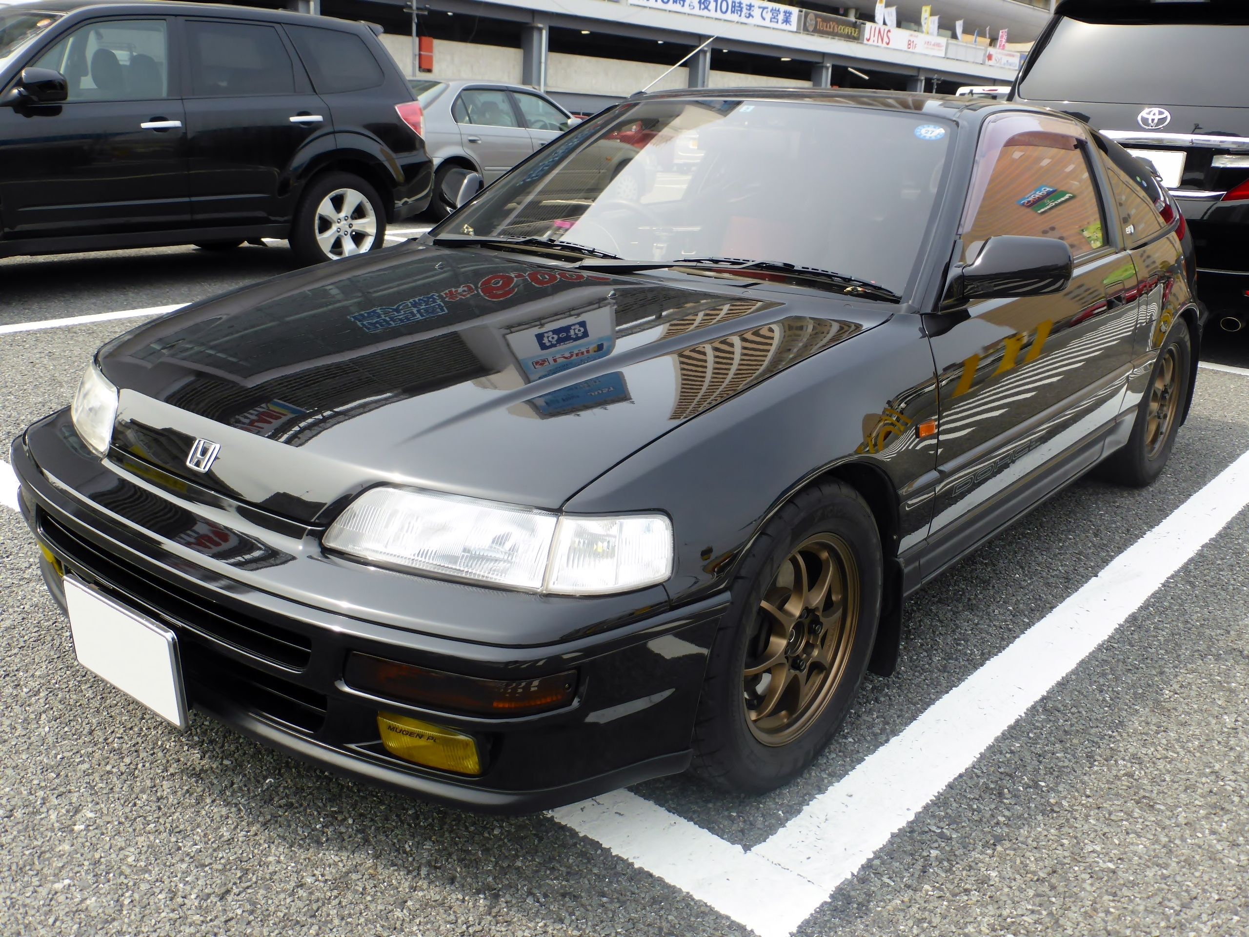 E-EF8型ホンダ・CR-X SiRをフロントから撮影。